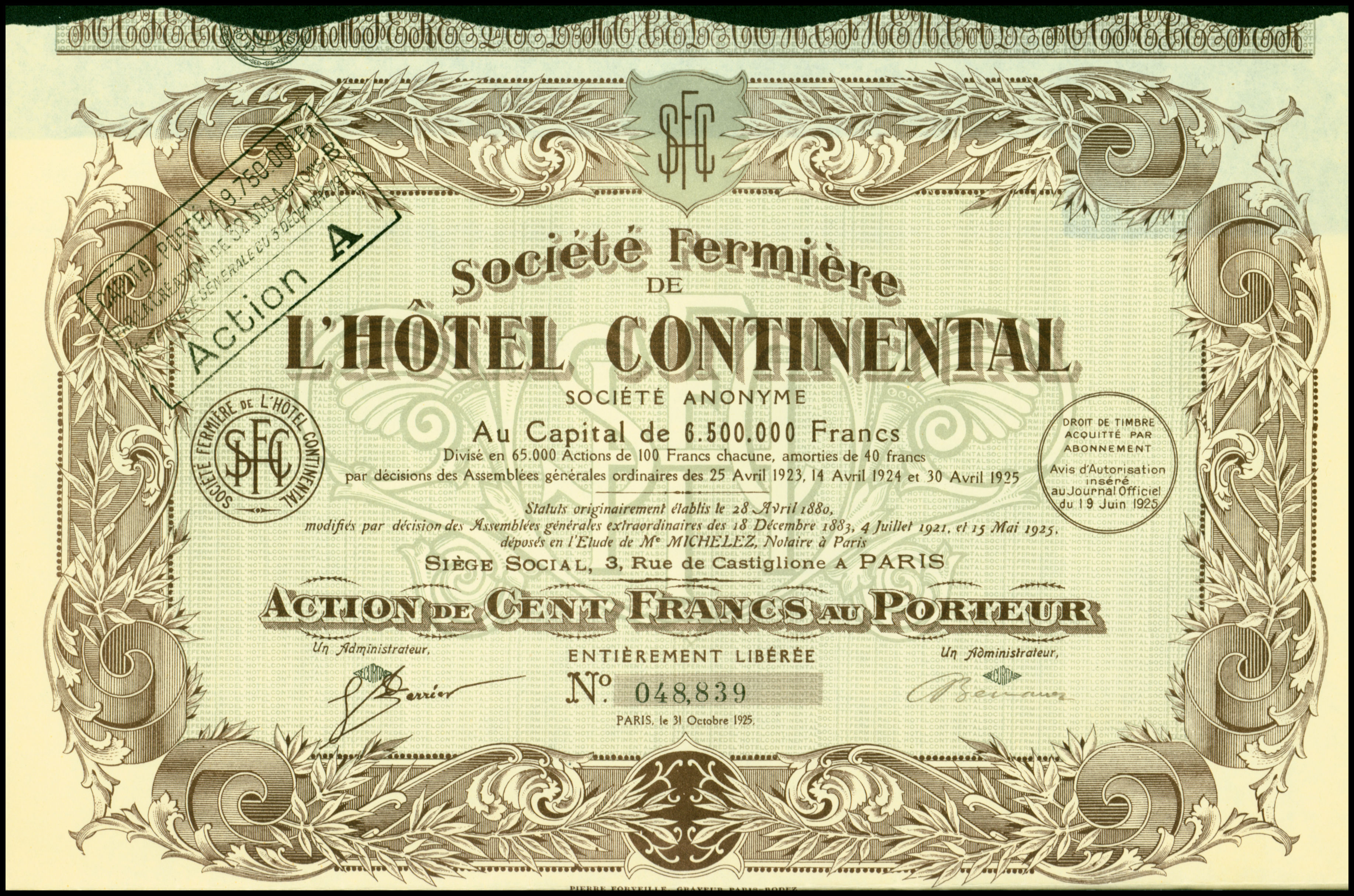 Aktie über 100 Francs der L'Hôtel Continental S. A. vom 31. Oktober 1925